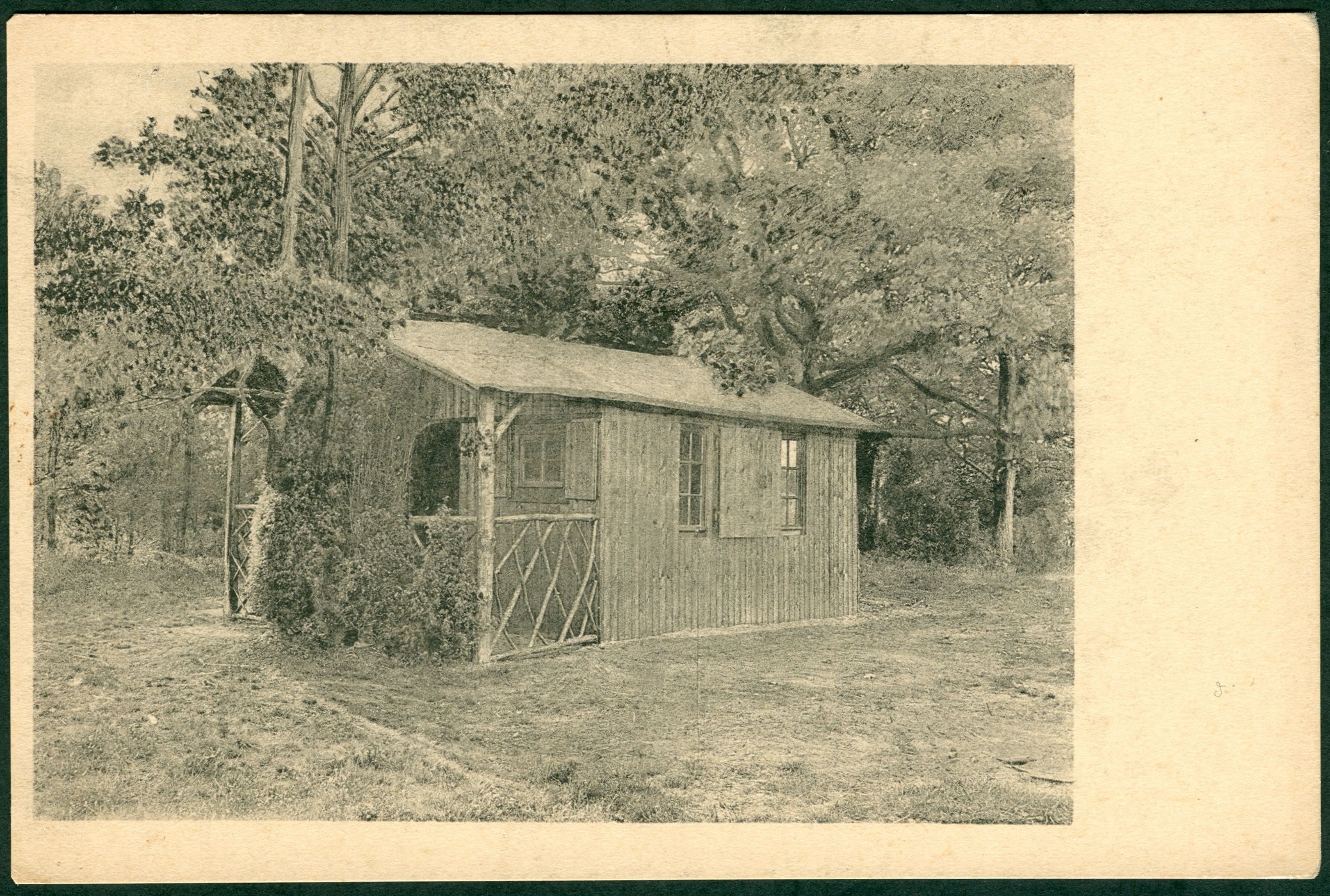 Die Ansichtskarte ohne Nummer von Ludwig Hemmer zeigt das Heideheim der hannoverschen Wandervögel.